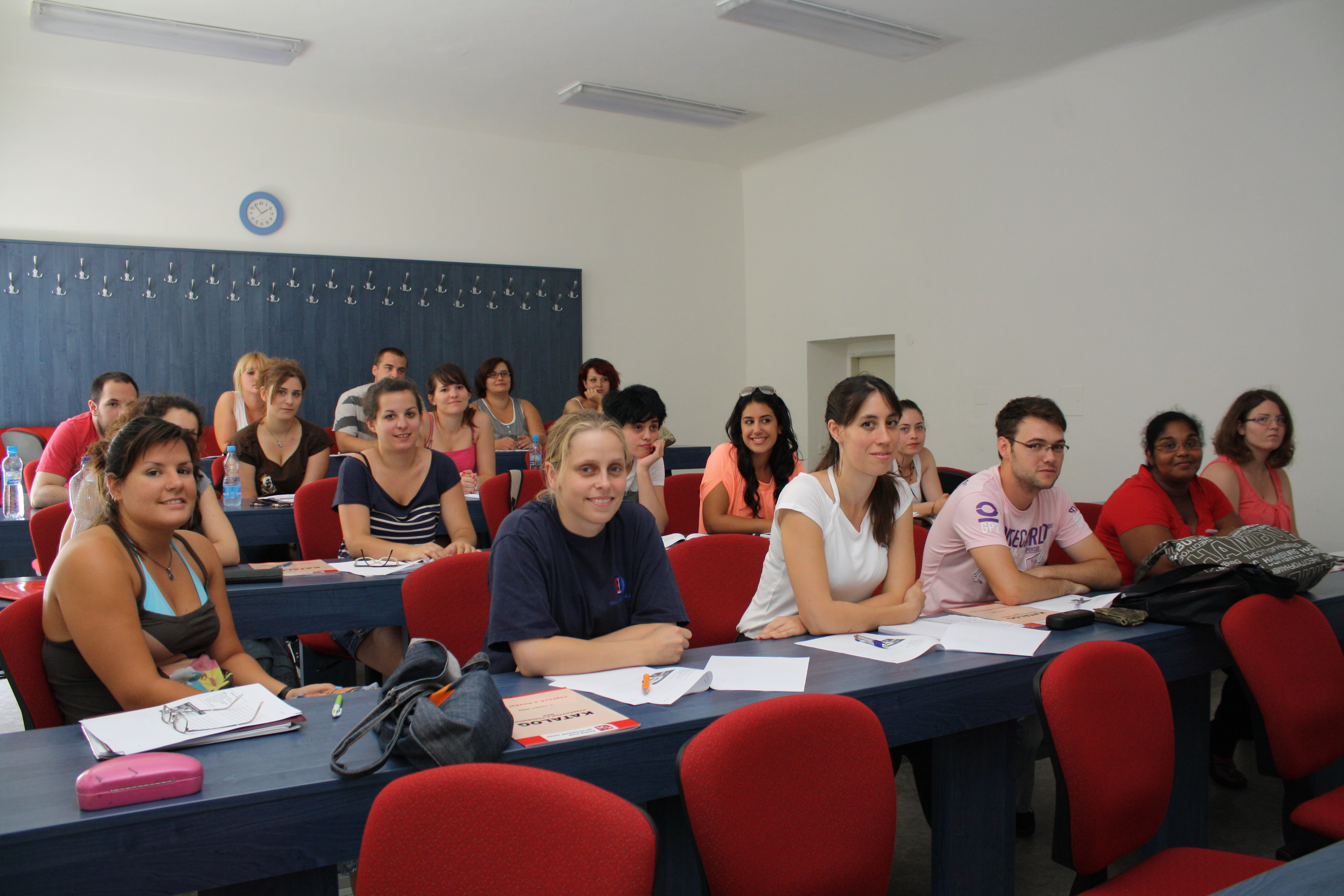 Ústav biochemie, chemie a biofyziky